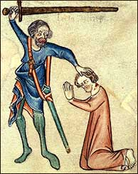 Exécution de Thomas Plantagenêt, comte de Lancastre, Leicester, Lincoln, Salisbury et Derby, baron de Halton